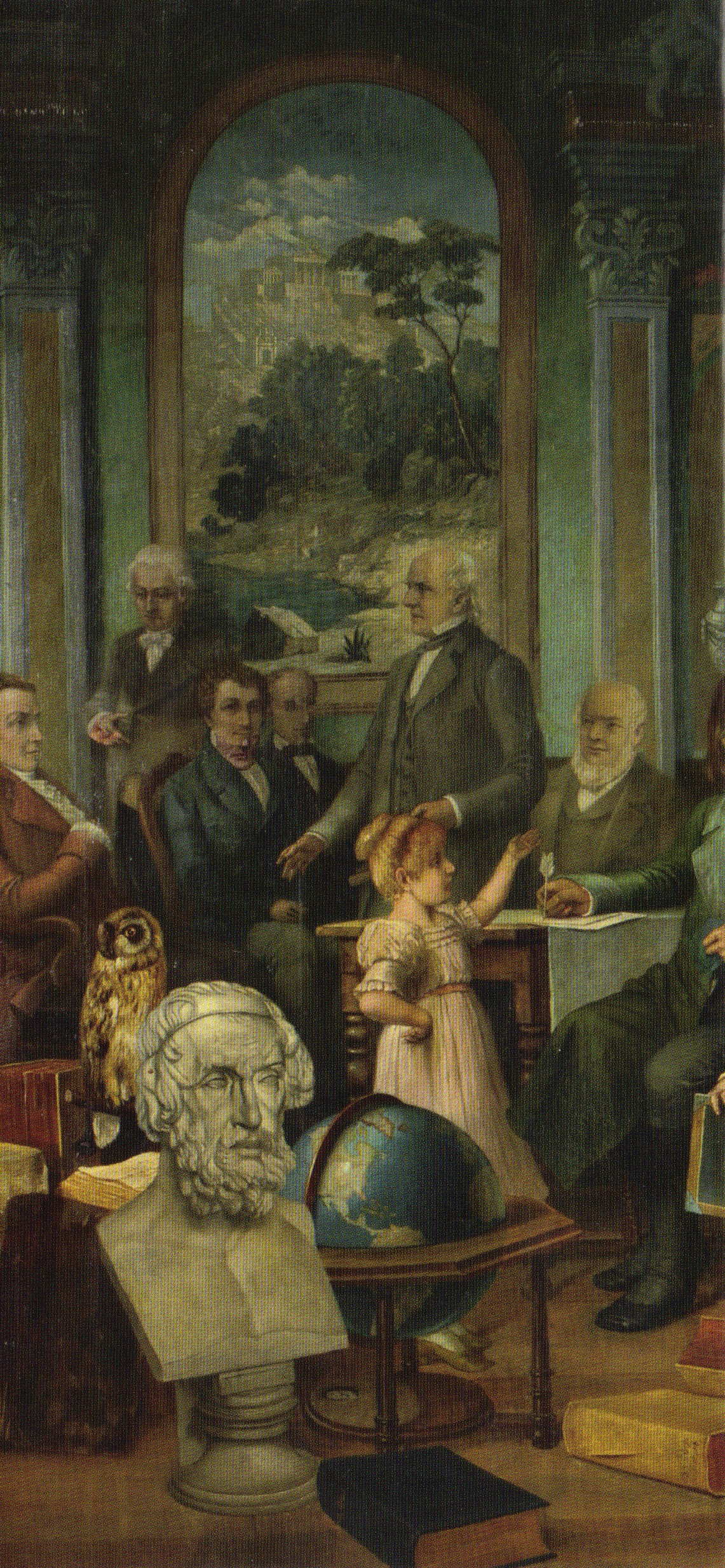 Ausschnitt vom Monumentalgemälde "Pädagogengemälde" von Paul Stade (1854-1931)